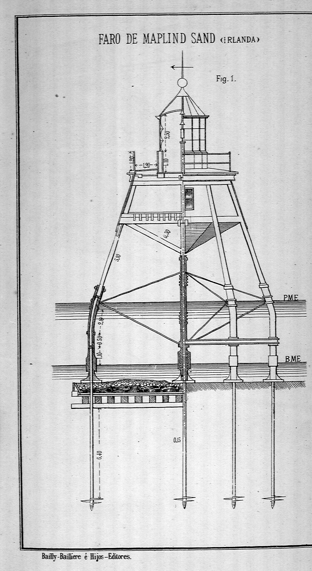 Faro de Maplin Sand (diseñado por James Walker) según dibujo de José Eugenio Ribera. El faro esta en Inglaterra y no en Irlanda como dice el dibujo. Notese also error en el nombre del faro (Maplind en vez de Maplin)